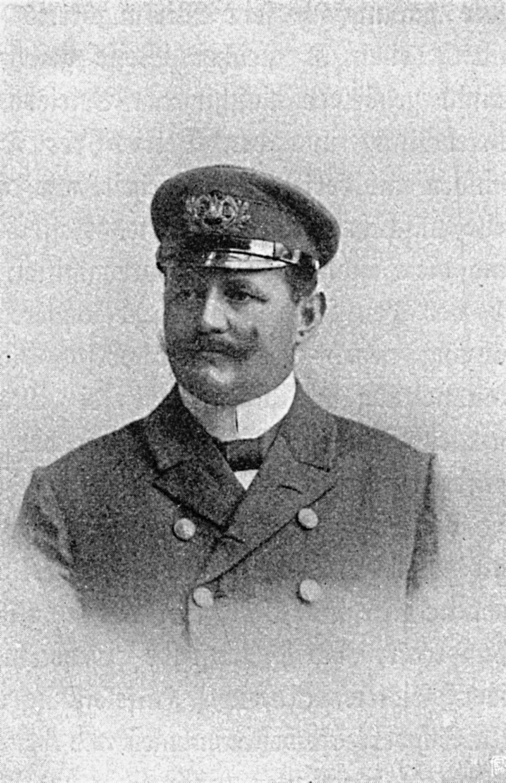 Рихард Фазель (1868 - 1912) - командир судна "Дойчланд" второй германской антарктической экспедиции